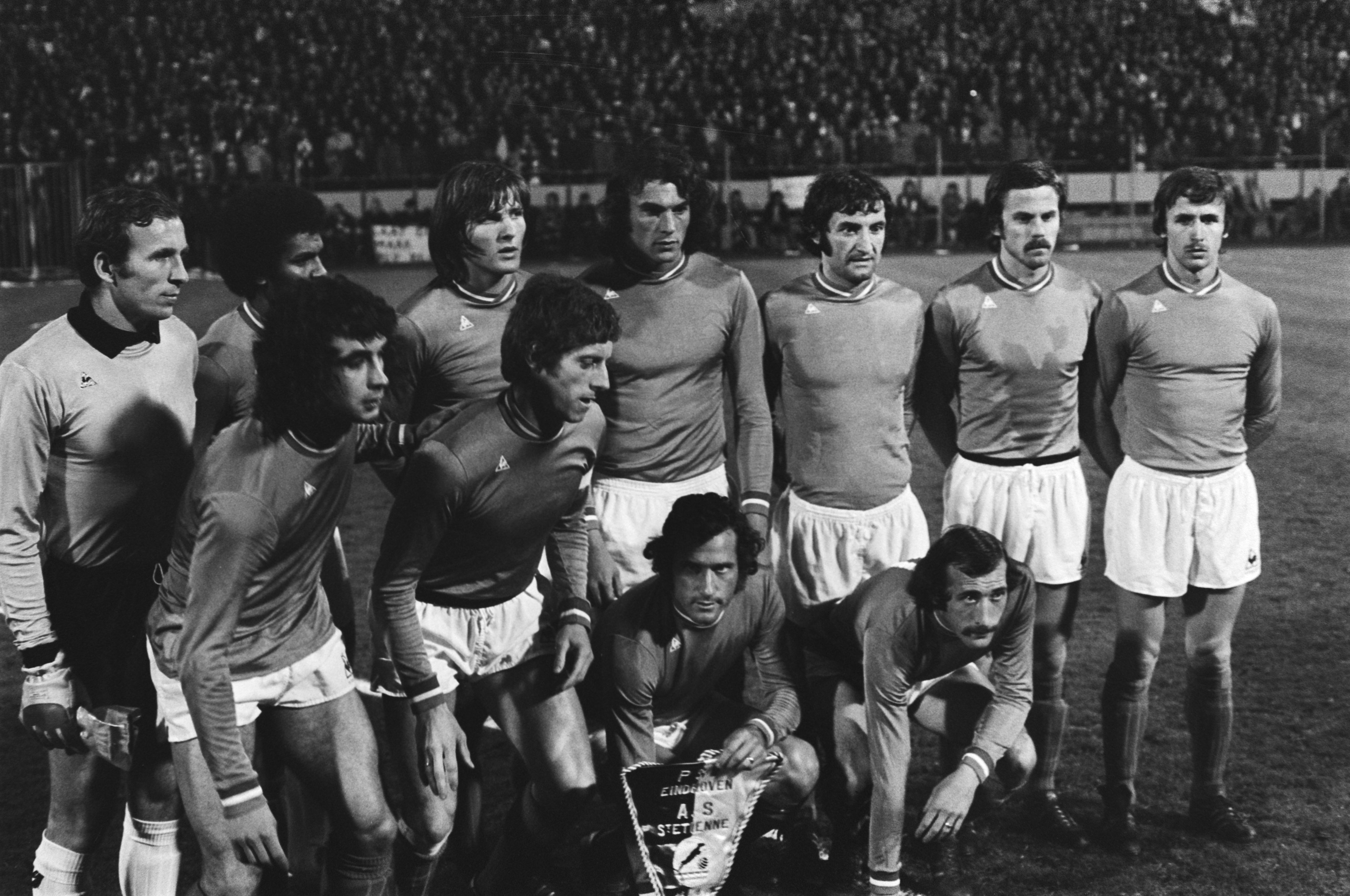 Collectie / Archief : Fotocollectie Anefo Reportage / Serie : [ onbekend ] Beschrijving : PSV tegen St. Etienne halve finale Europa Cup I, Elftal St. Etienne Datum : 14 april 1976 Locatie : Eindhoven Trefwoorden : elftallen, sport, voetbal, voetballers Instellingsnaam : Europa Cup Fotograaf : Verhoeff, Bert / Anefo Auteursrechthebbende : Nationaal Archief Materiaalsoort : Negatief (zwart/wit) Nummer archiefinventaris : bekijk toegang 2.24.01.05 Bestanddeelnummer : 928-5253